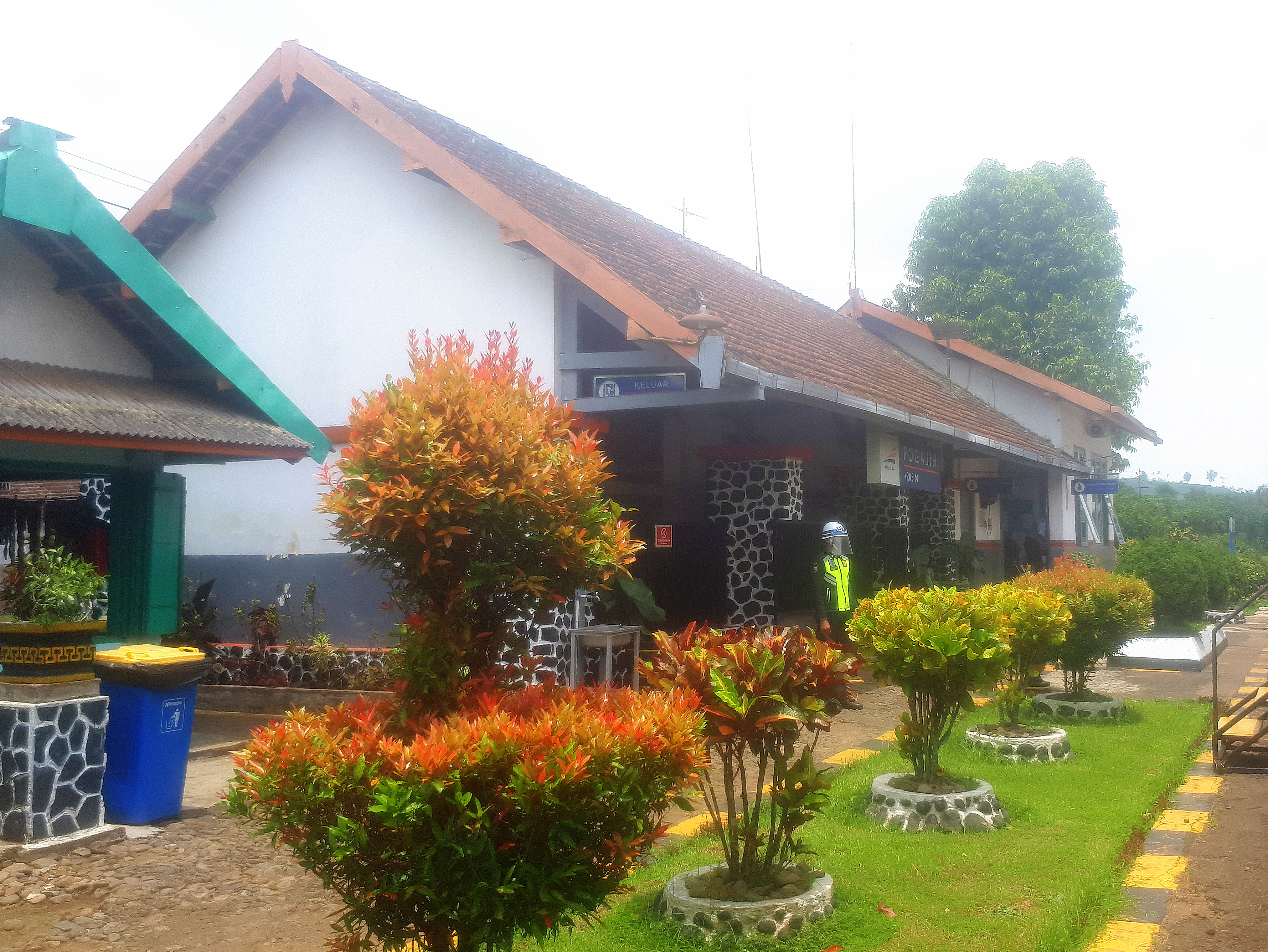 Stasiun Pogajih pada tahun 2020. Foto ini diambil dari dalam kereta api Penataran